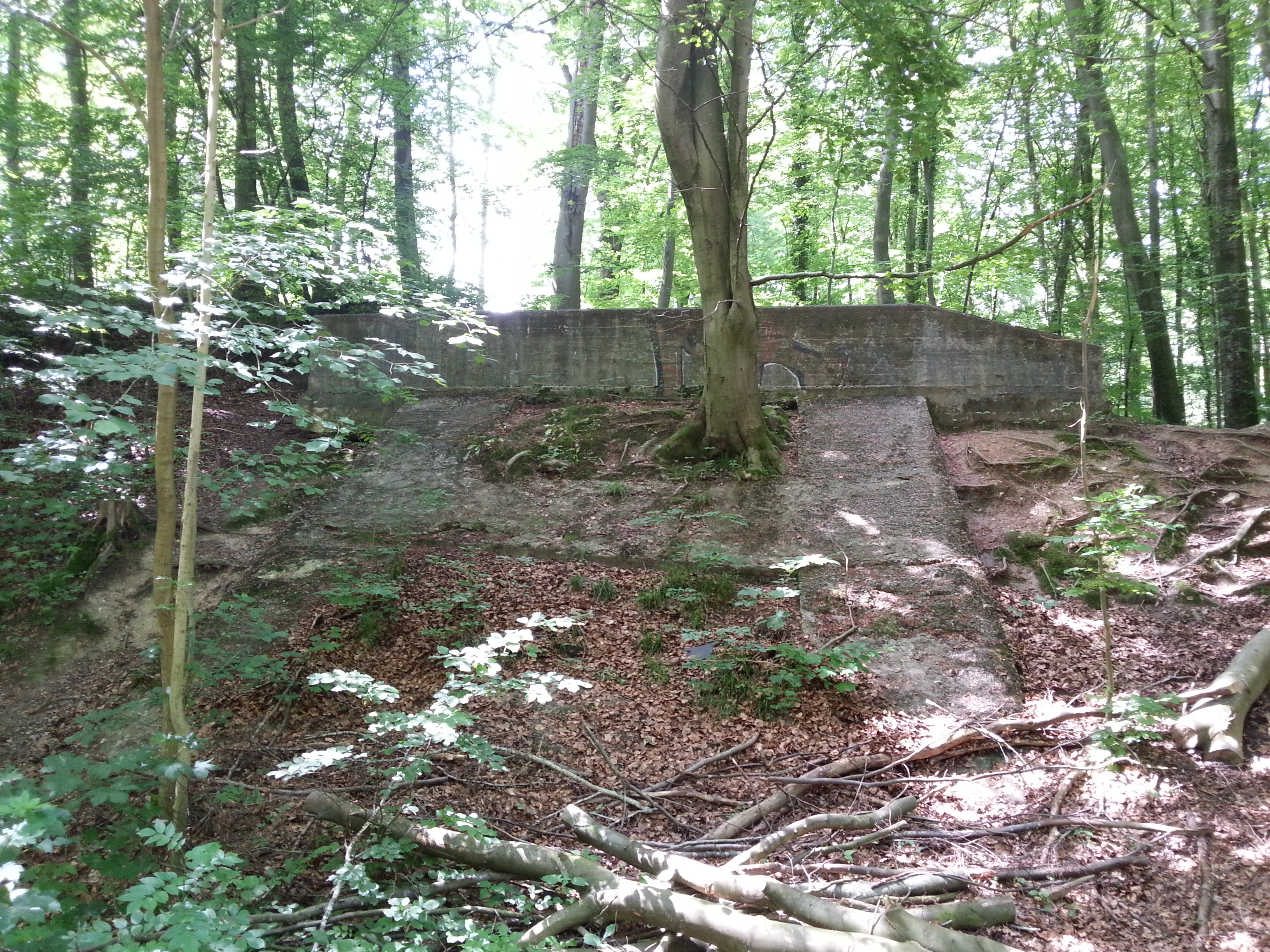 Afspærringsanlæg anlagt af tysker under anden verdenskrig. Afspærringen stod på begge sider af det nu nedlagte Troldhedebane.